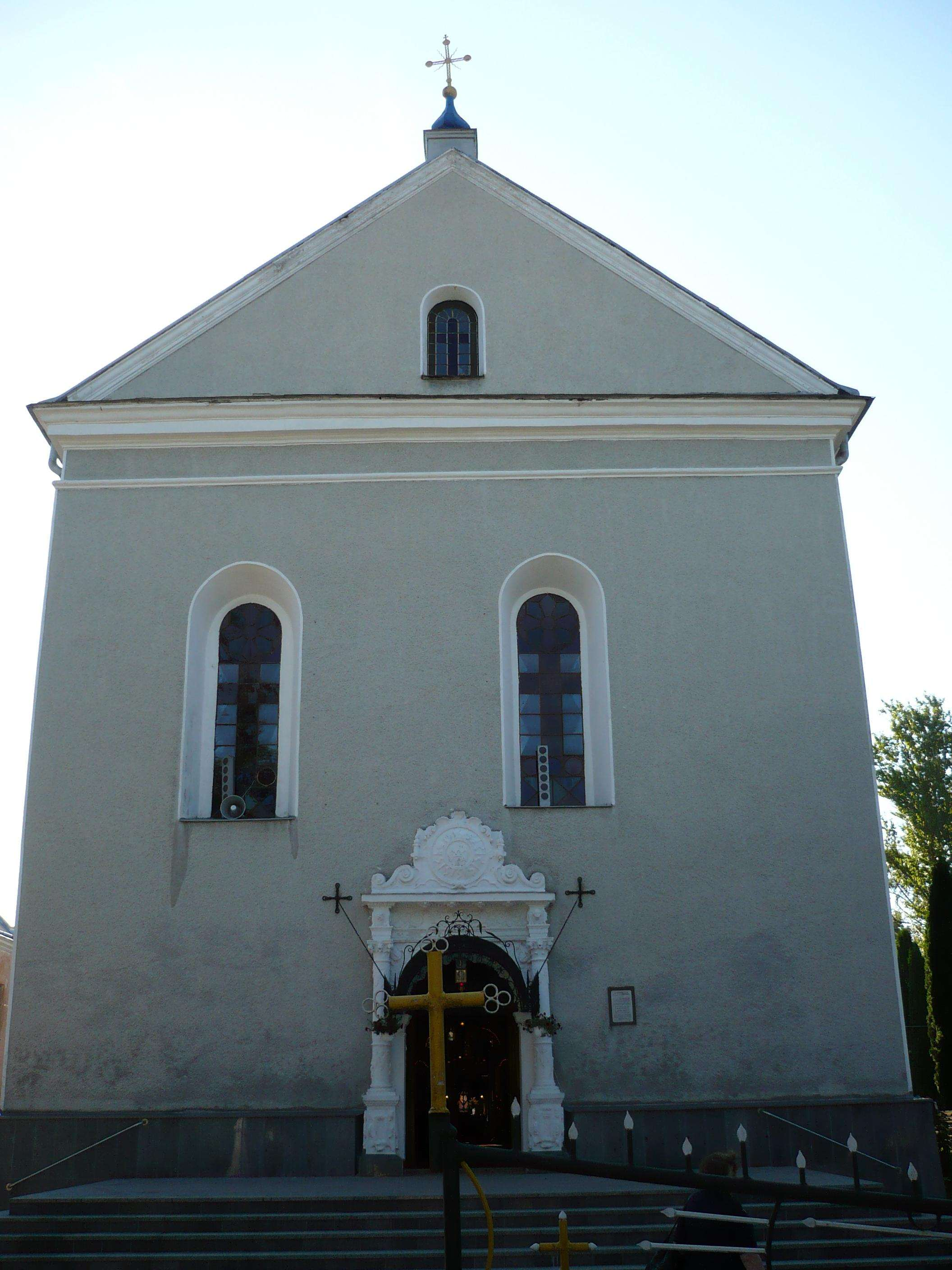 Unicka cerkiew pw. Zmartwychwstania w Złoczowie z 1624 r.